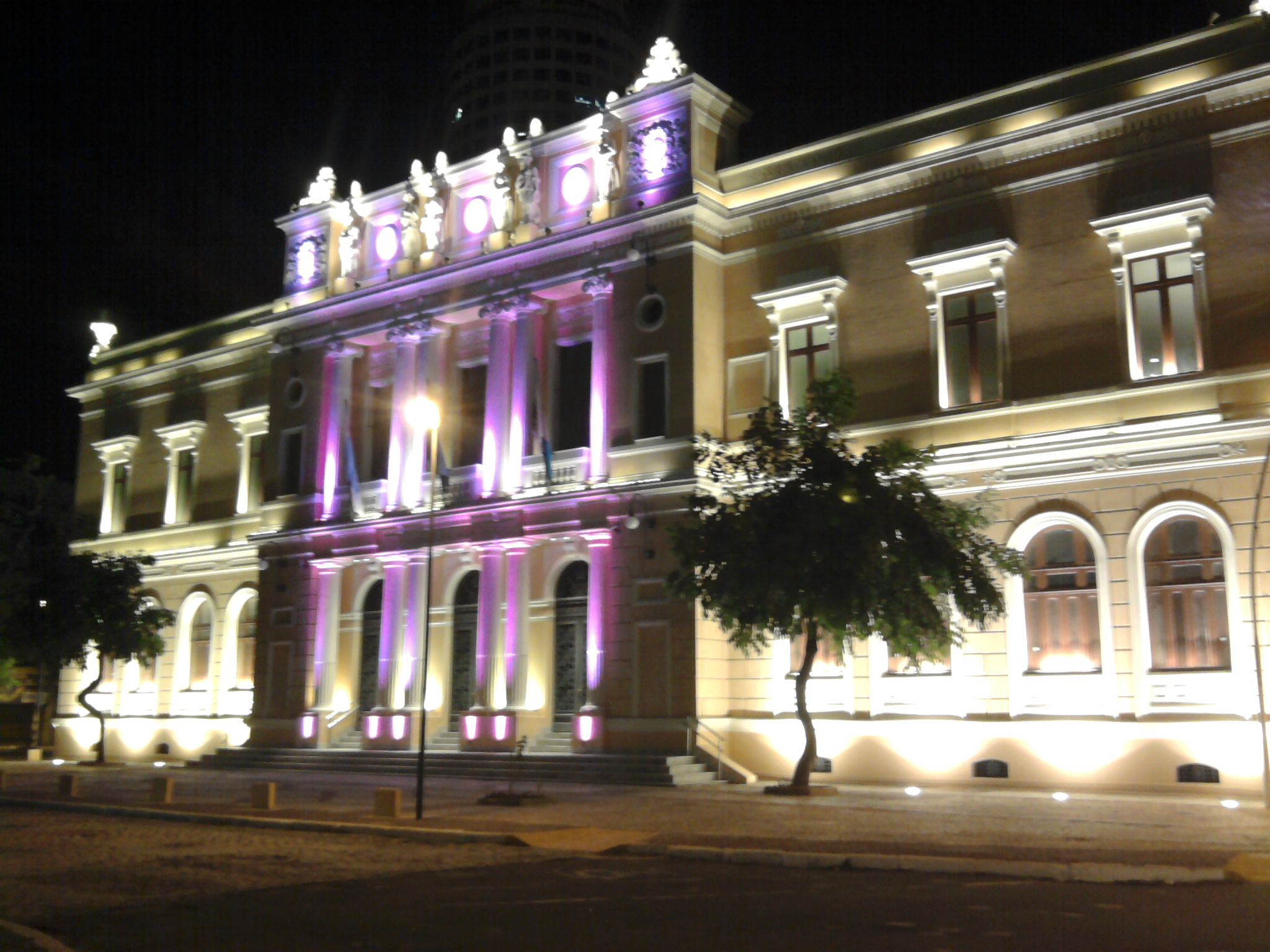 Antiga sede do Tribunal de Justiça do Rio de Janeiro e posteriormente do Fórum de Niterói, situado na Praça da República, e inaugurada em 1919. Atualmente abriga o Centro de Memória Judiciária de Niterói.